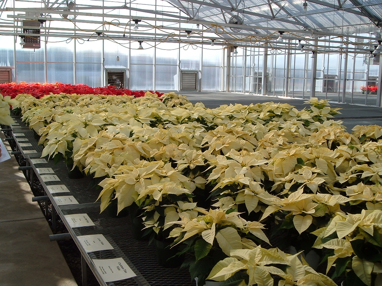 Source: Max Wahrhaftig